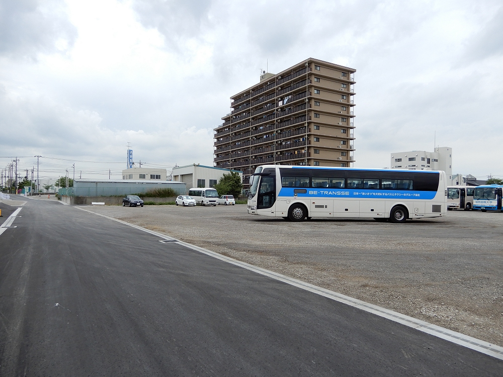 西岬観光本社